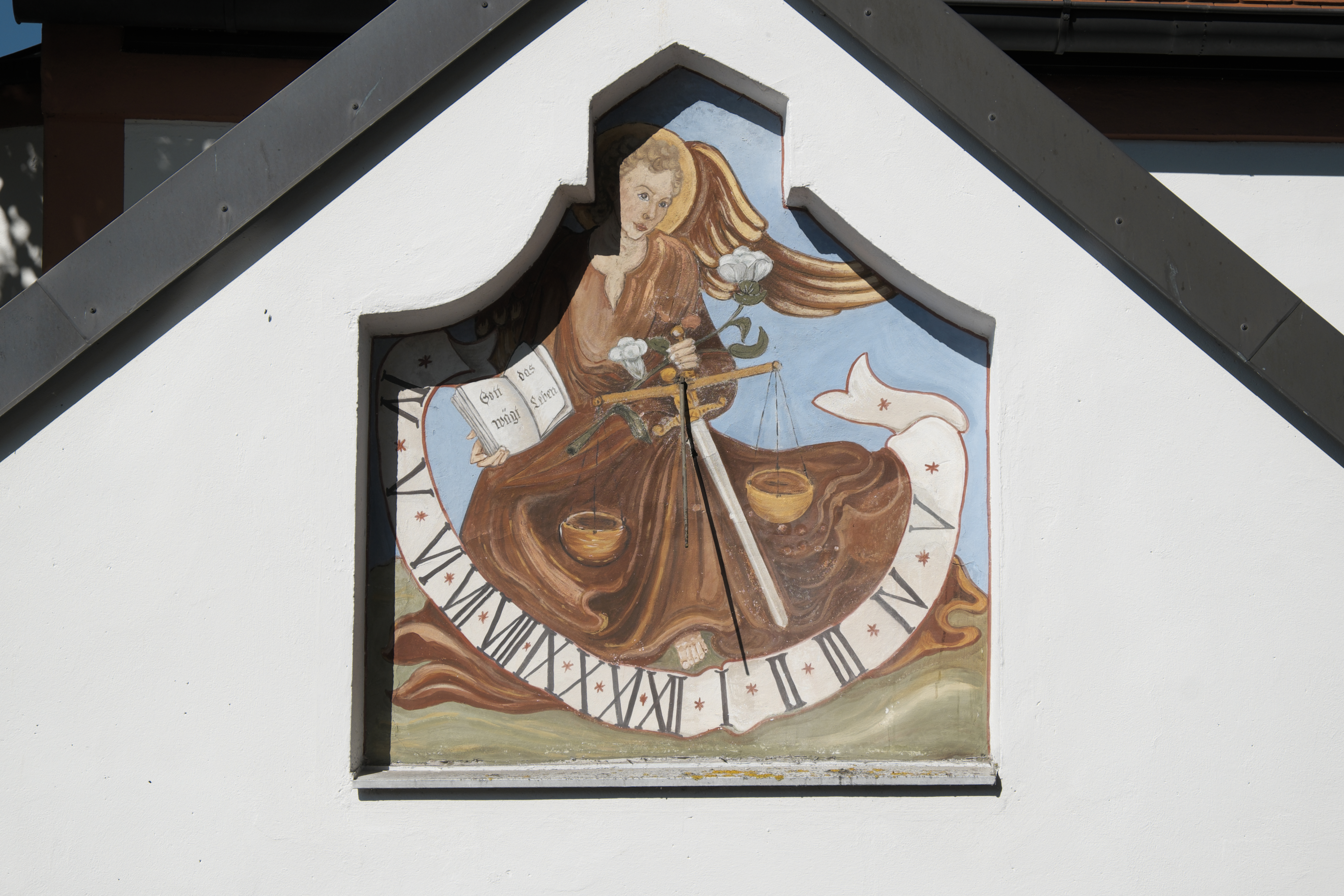 Katholische Filialkirche St. Sebastian in Puch, einem Stadtteil von Fürstenfeldbruck im Landkreis Fürstenfeldbruck (Bayern/Deutschland), Sonnenuhr am Vorzeichen